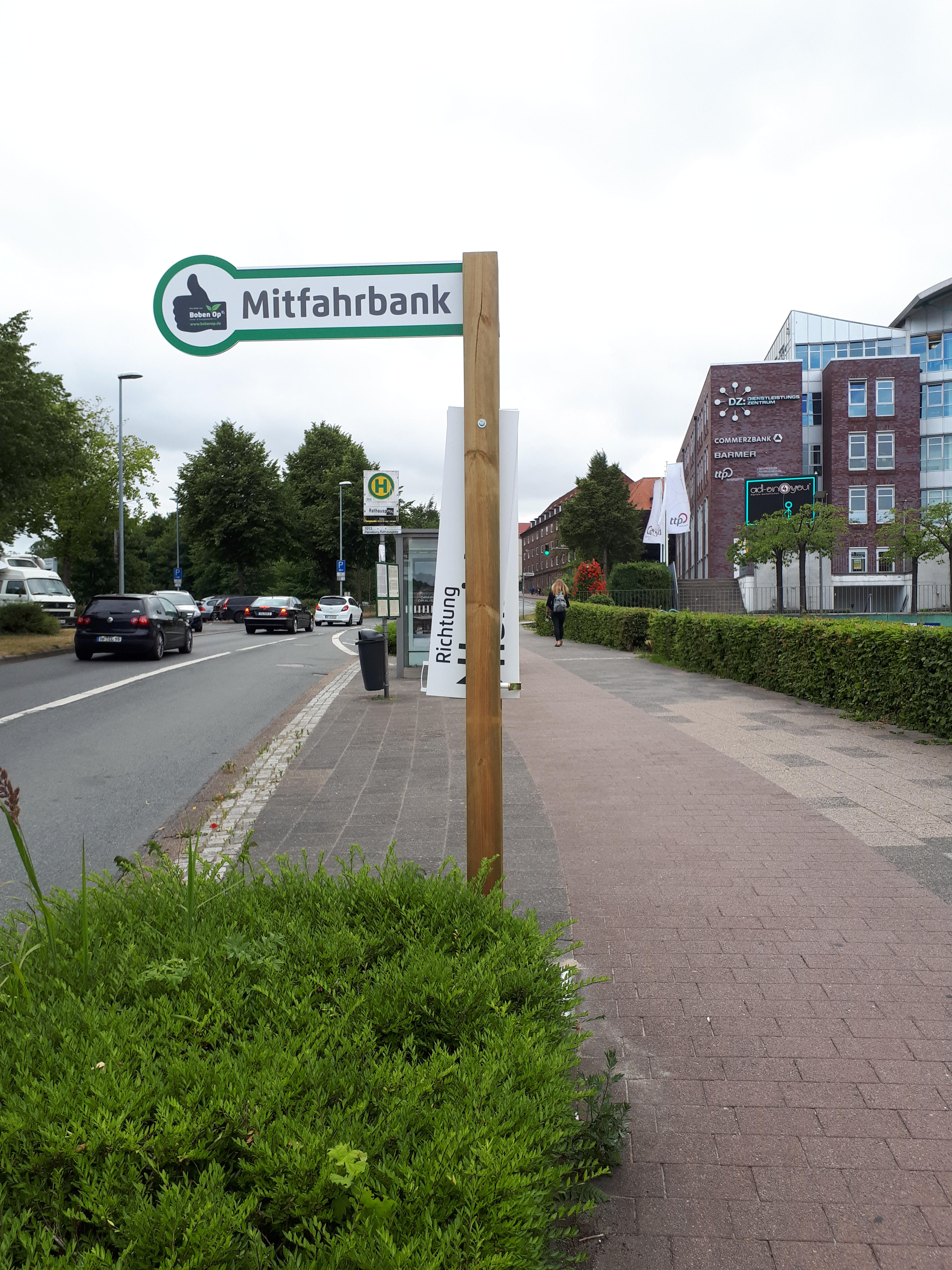 Mitfahrerbank am Neumarkt, Flensburg